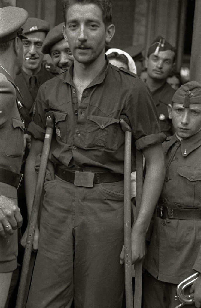 Título original: Llegada a la estación del Norte de soldados heridos en el frente del Este (3/13) Localización: San Sebastián (Guipúzcoa)